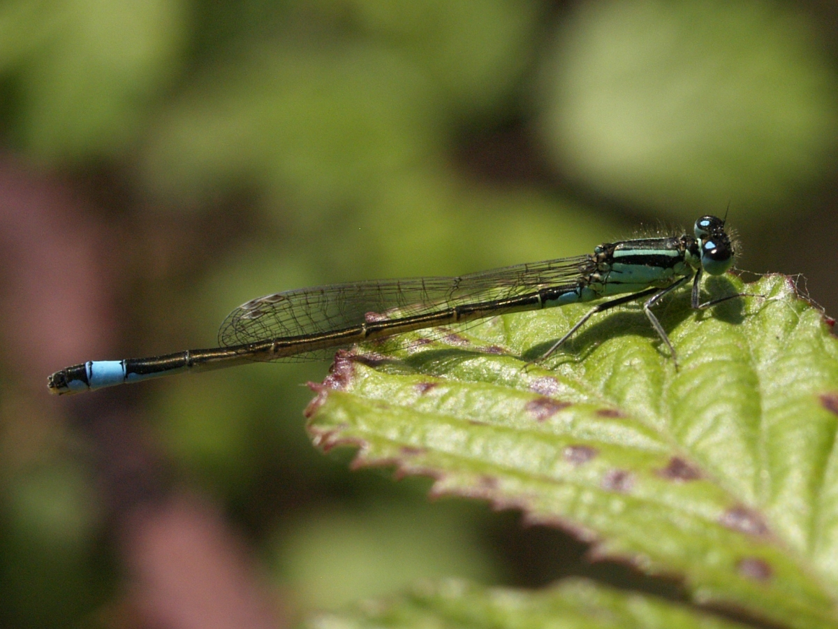 Ischnura graellsii femella